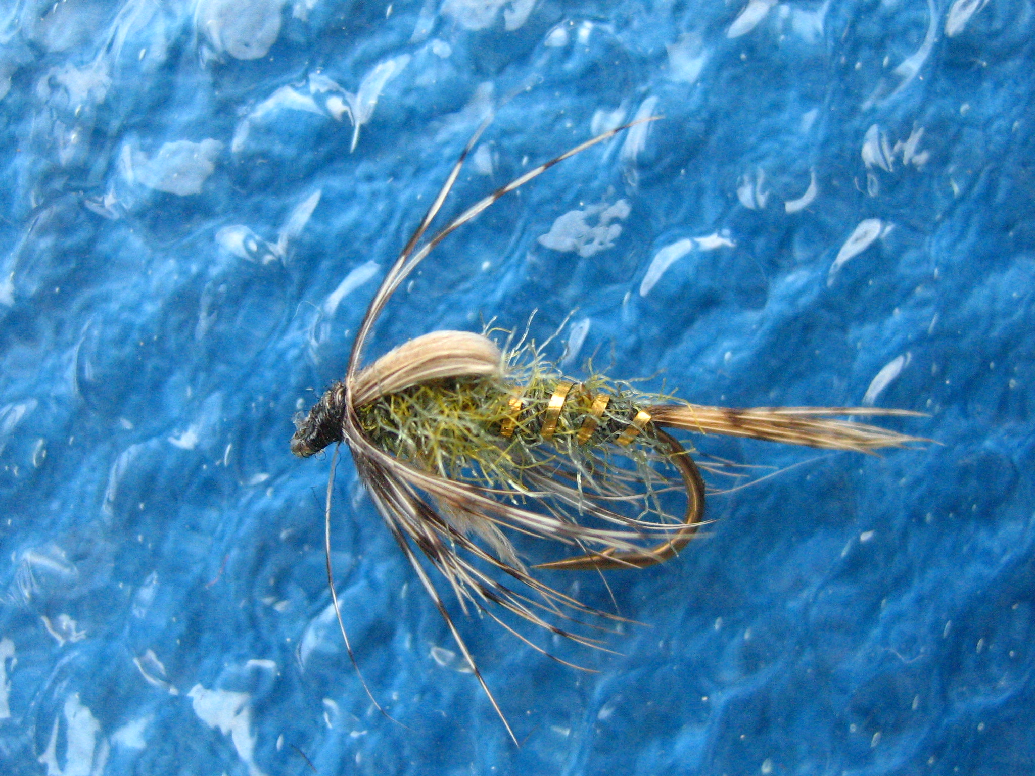 Nymfa Březnovky - modifikace (March Brown nymf)